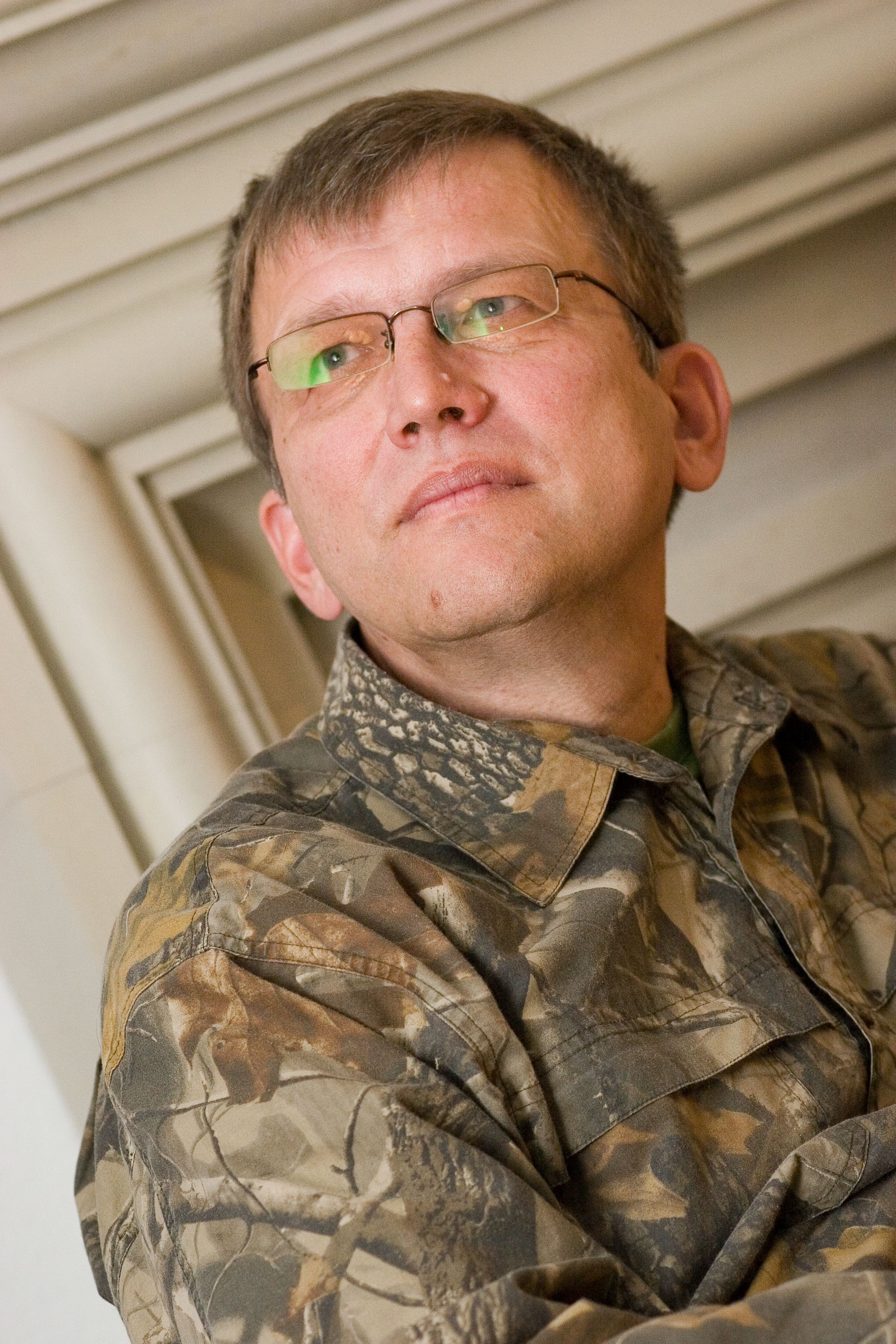 Õuesõppe eestvedaja.